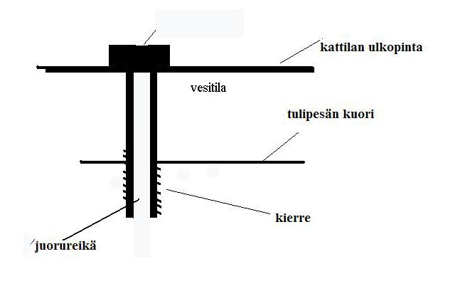 höyrykattilan sidepultin rakenne